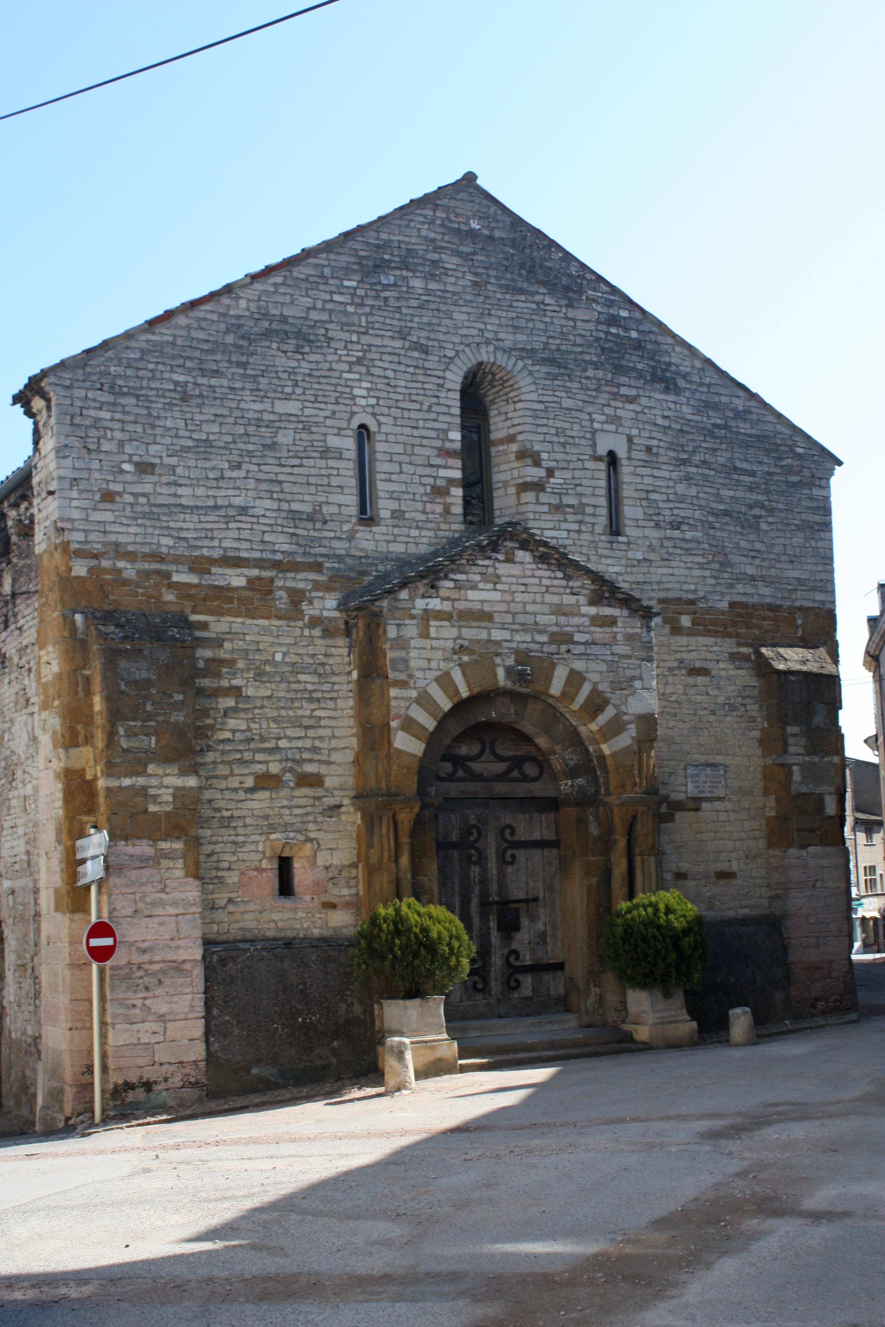 Église Saint Valérien, Martyre et saint patron de Tournus